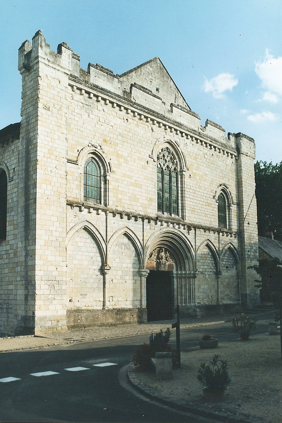 N.-D. Cunault, Fassade von NW